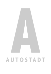 Markenlogo der Autostadt 2013